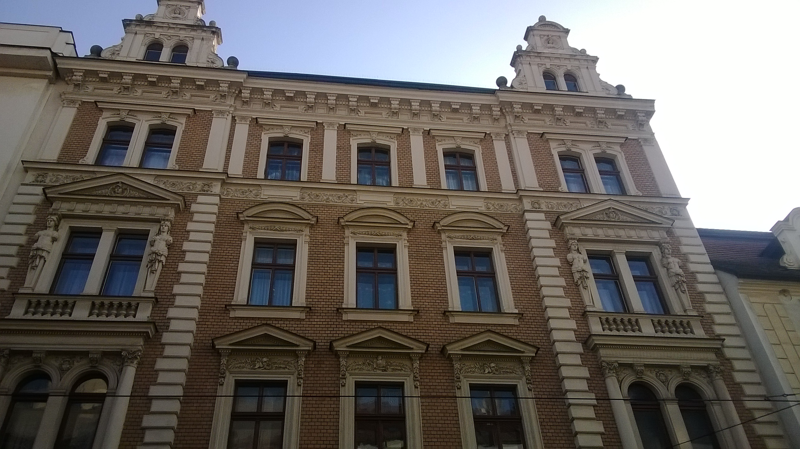 Dům Josefa Kajetána Tyla